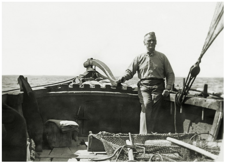 Feriengast am Steuer eines Kurenkahns. Sehr gut sind der Helmhold und die Kerbe zu erkennen, in der das Steuer festgesetzt wird. Im Vordergrund ist ein Teil des Keitelbaums mit der Bott und dem daran befestigten Keitelnetz zu sehen. Daraus ist auch ersichtlich, daß es sich wahrscheinlich nicht nur um einen Bootsausflug handelte, sondern der Feriengast bei einer Fangfahrt dabei war.